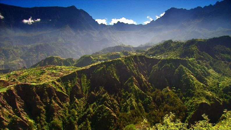 Vue sur les montagnes de Cilaos.